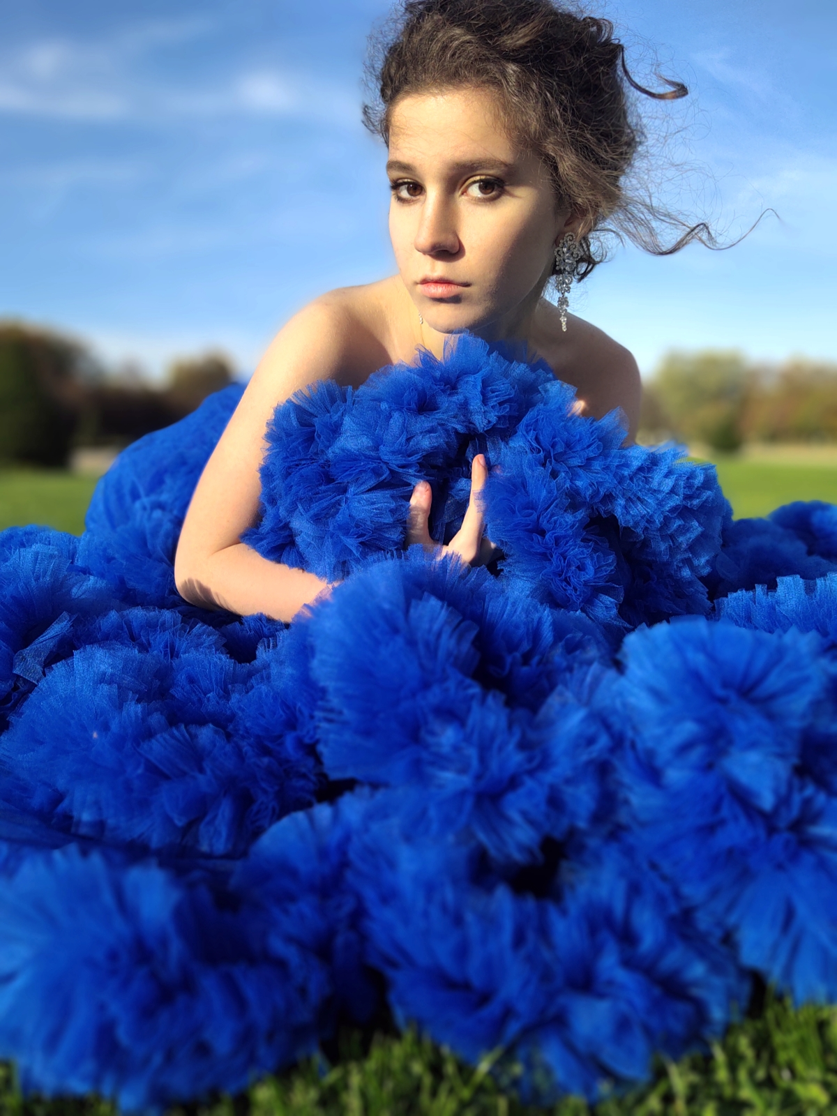 Фото юной оперной певицы Соломии Лукьянец